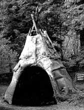 Abenaki wigwam with birch bark covering Картинка:Вигвам на племето абнаки.jpg